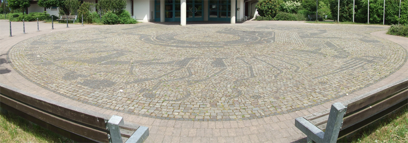 Pflastermosaik vor der Petersberghalle in Gau-Odernheim